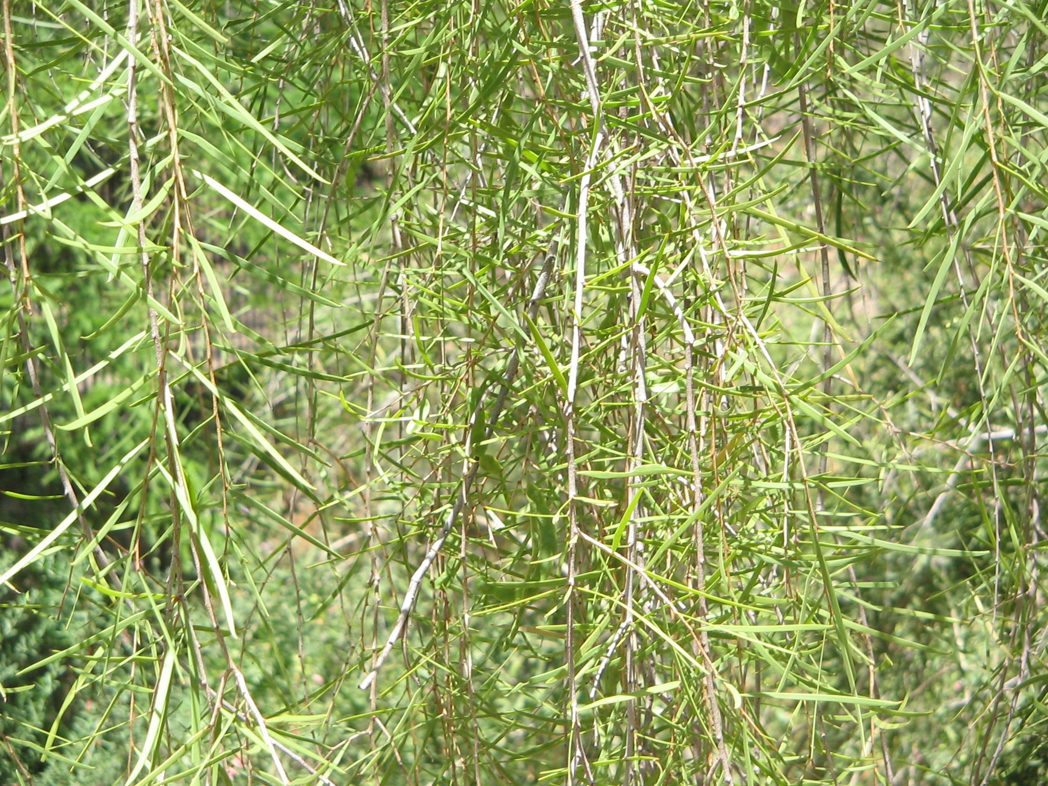 Acacia estrophiolata Foliage Phoenix Desert Botanical Gardens